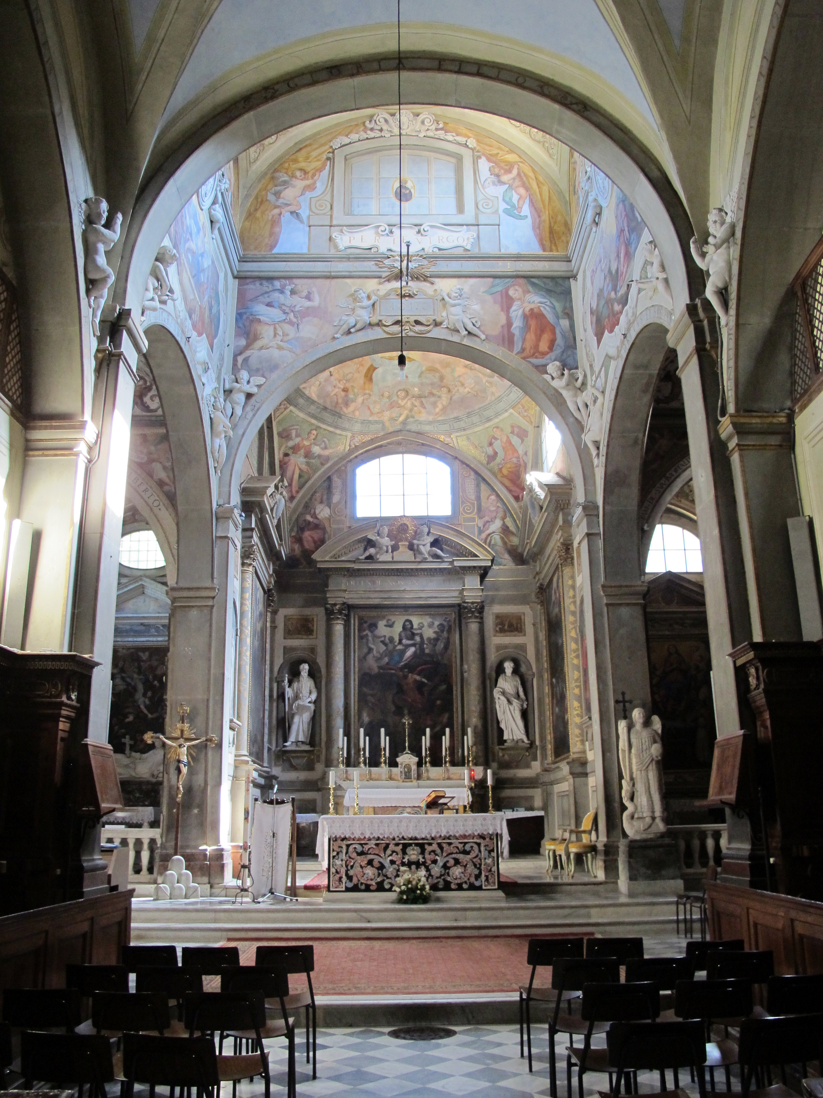 Abbazia di San Michele Arcangelo a Passignano